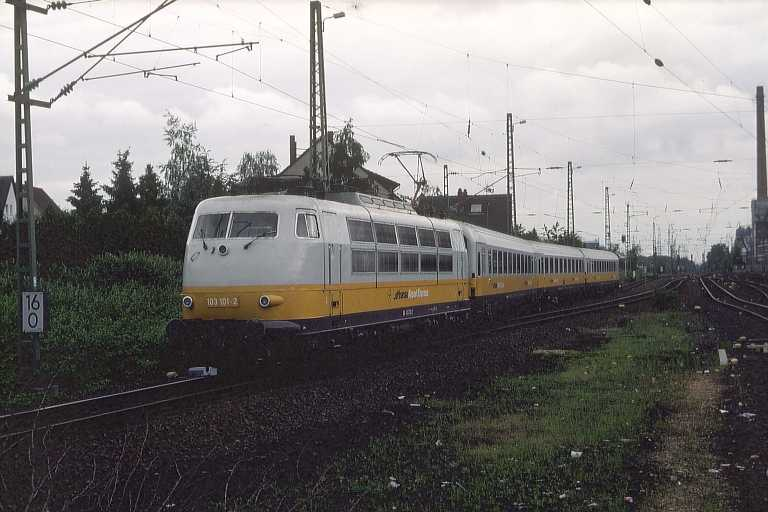 DB Baureihe 103 in Lufthansa-Airport-Express-Lackierung in Kelsterbach